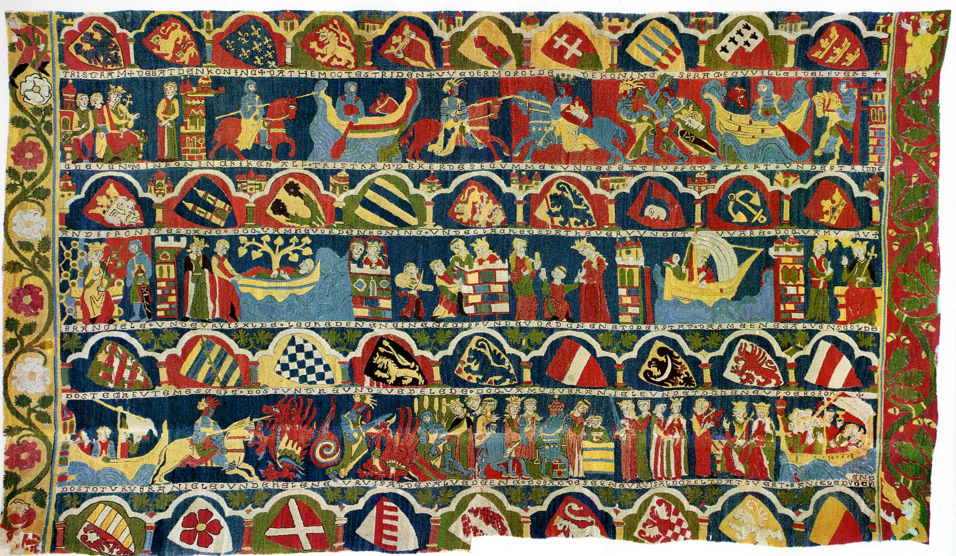 Gesamtansicht des sogenannten Tristanteppichs, Wandbehang, ca. 1300, Wolle, im Klosterstich ausgeführte flächendeckende Fadenapplikation, Kloster Wienhausen bei Celle, Deutschland.